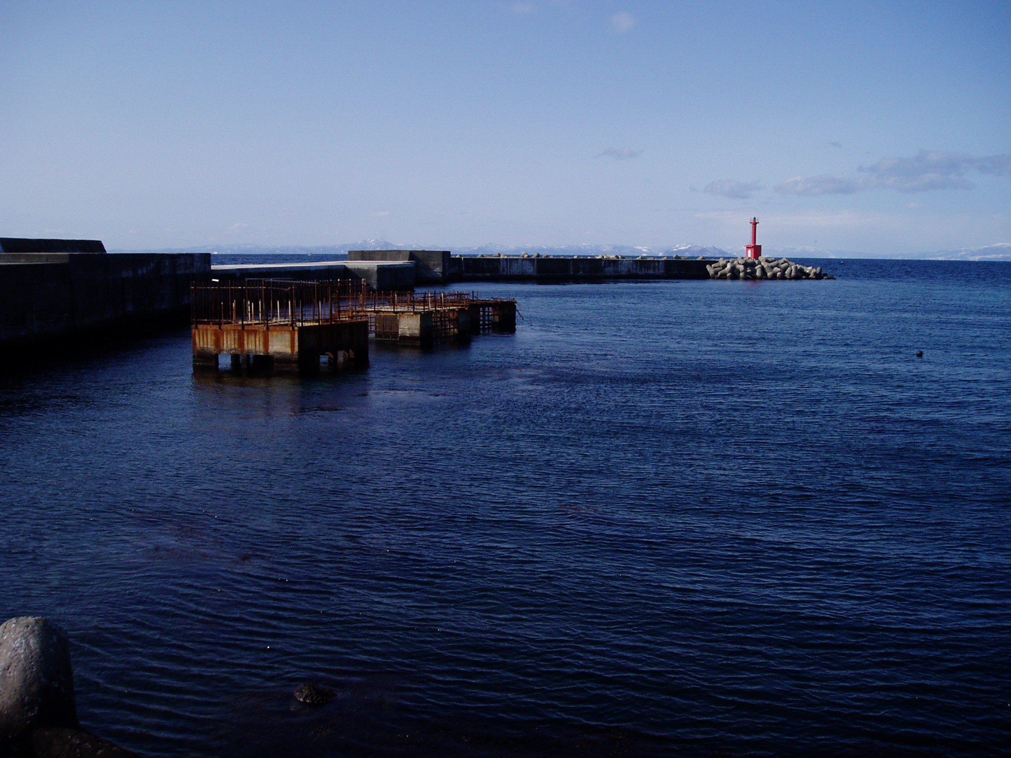 大間港旧フェリー埠頭